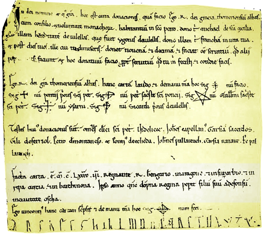 Raimundo, abad de Tomeras, da a Miguel de Santa Cilia una heredad de Vilellas. En el lugar de la datación se señala que está escrita «el año cuando doña reina [Petronila de Aragón] parió su hijo Alfonso en la ciudad de Huesca». Transcripción del párrafo sombreado completo: «Facta carta era Mª. Cª. LXXXXª. VIª., regnante Raimundo Berengario in Aragone et in Superarbio [Sobrarbe] et in Ripacurcia [Ribagorza] et in Barchinona, ipso anno quando dompna regina peperit filium suum Adefonsum in civitate Oscha».